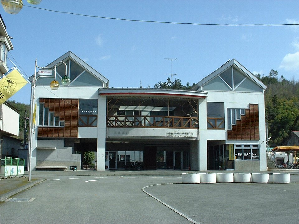 福塩線・三良坂駅